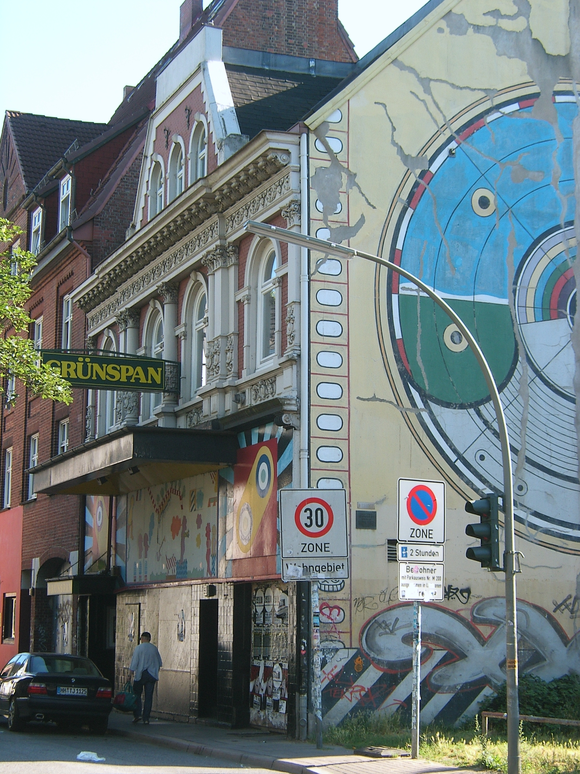 Das Grünspan in der Großen Freiheit auf St. Pauli ist seit 1968 einer der bekanntesten Hamburger Musikklubs. Früher befand sich dort ein Kino.